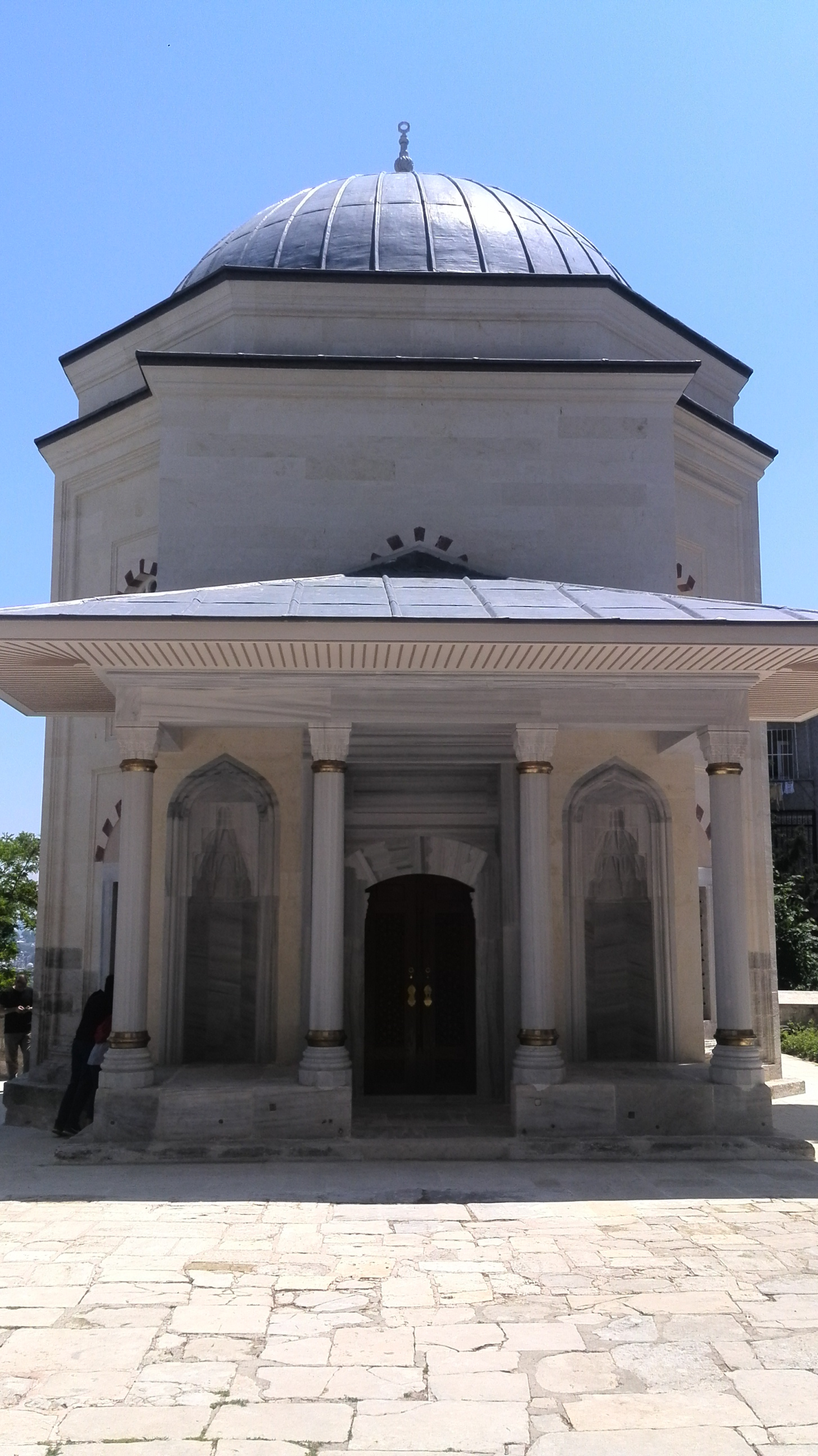 Ayşe Hafsa Valide Sultan'ın Yavuz Selim Camii'nin bahçesinde bulunan türbesi.